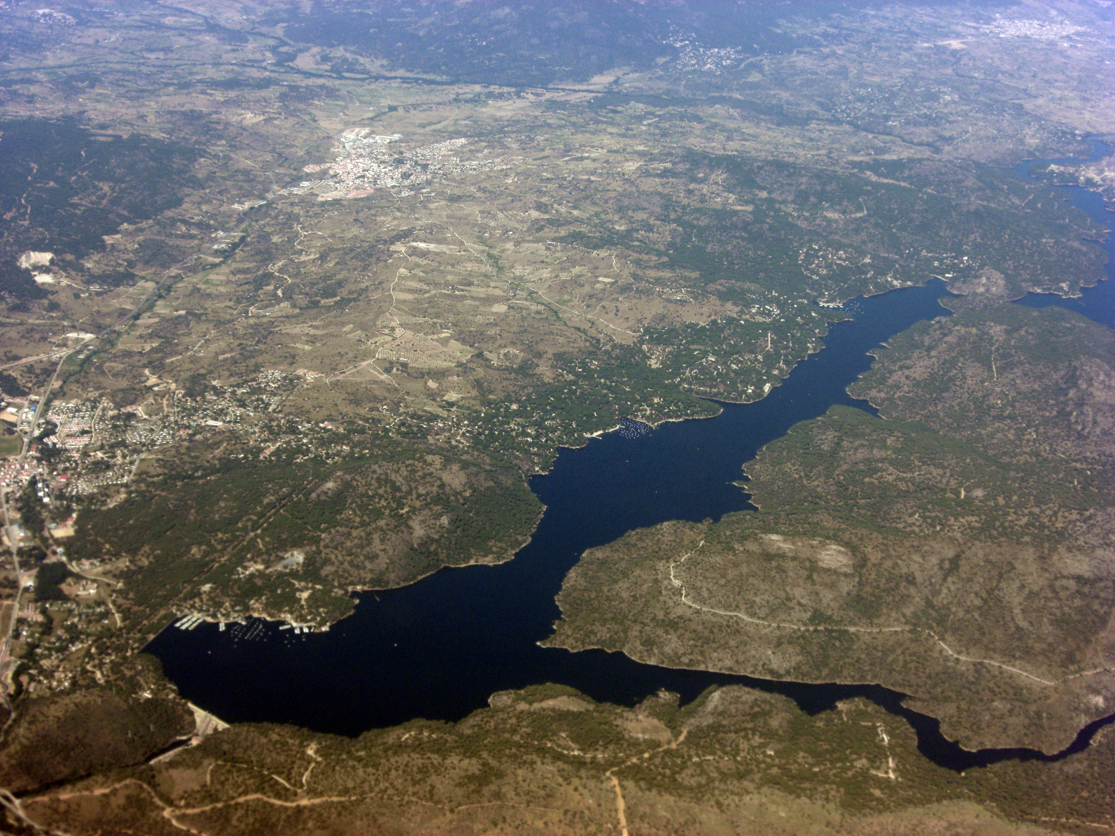 Vista aérea del embalse de San Juan